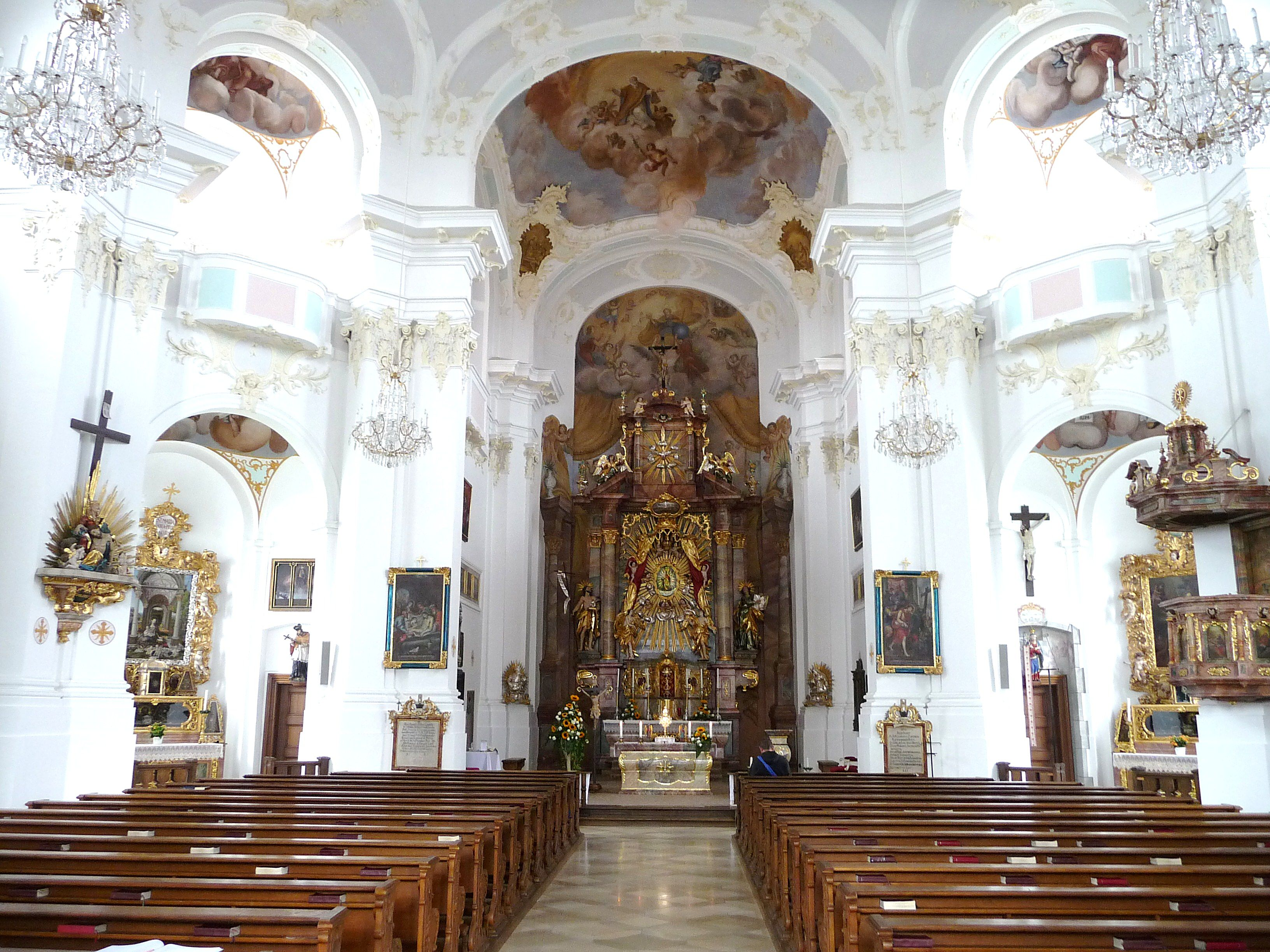 Inneres der Wallfahrtskirche Maria Schnee in Aufhausen